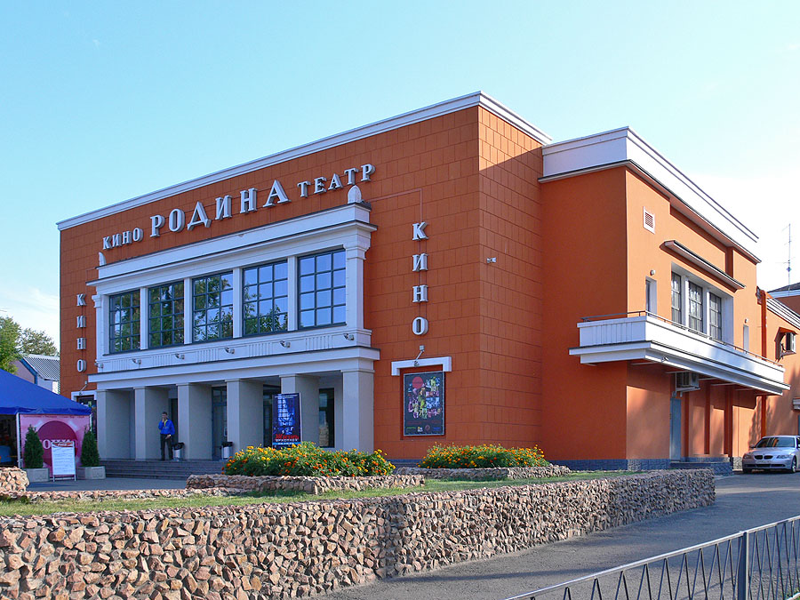 Rodina Cinema in Barnaul